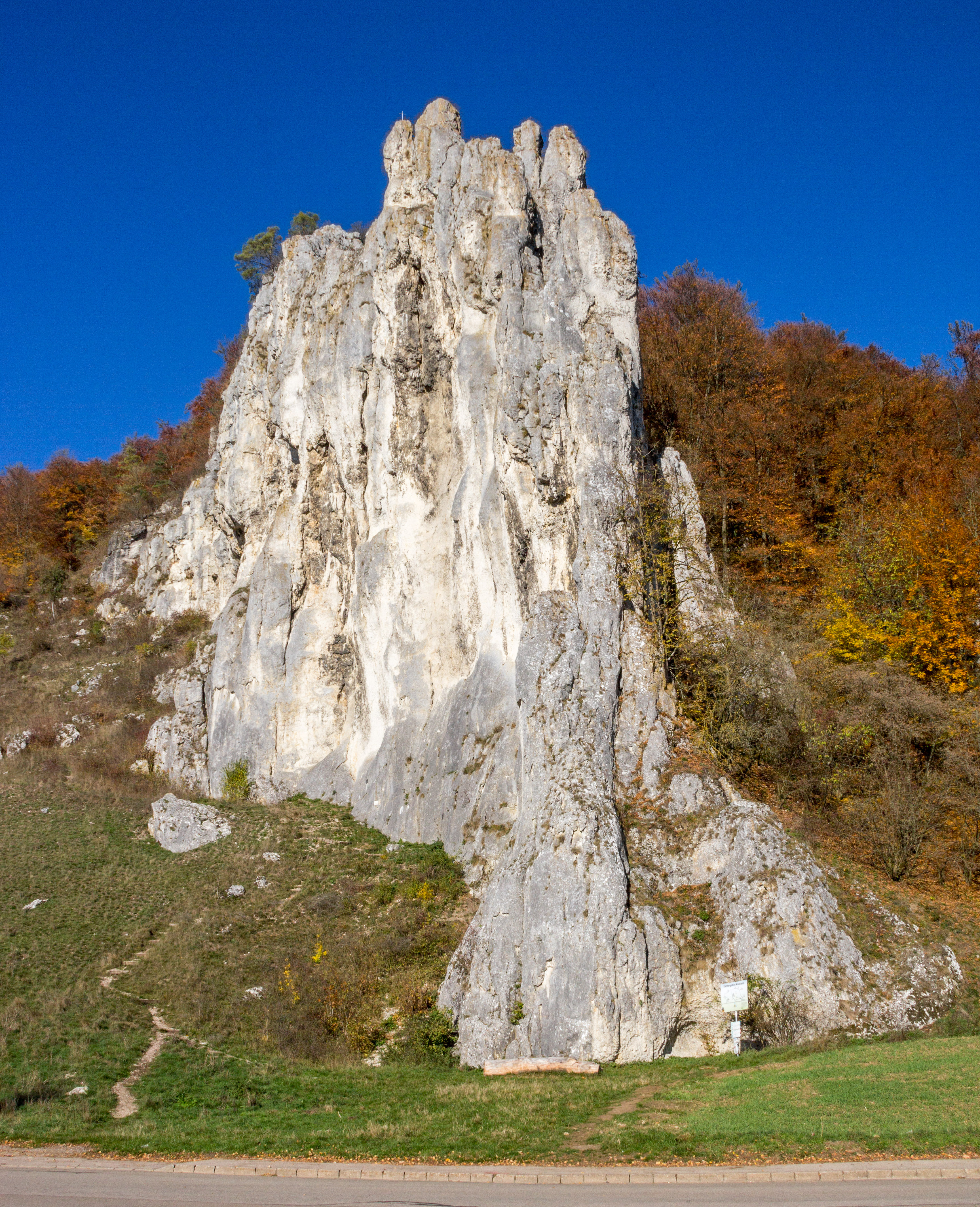 Wellheim, Dohlenstein, Geotop